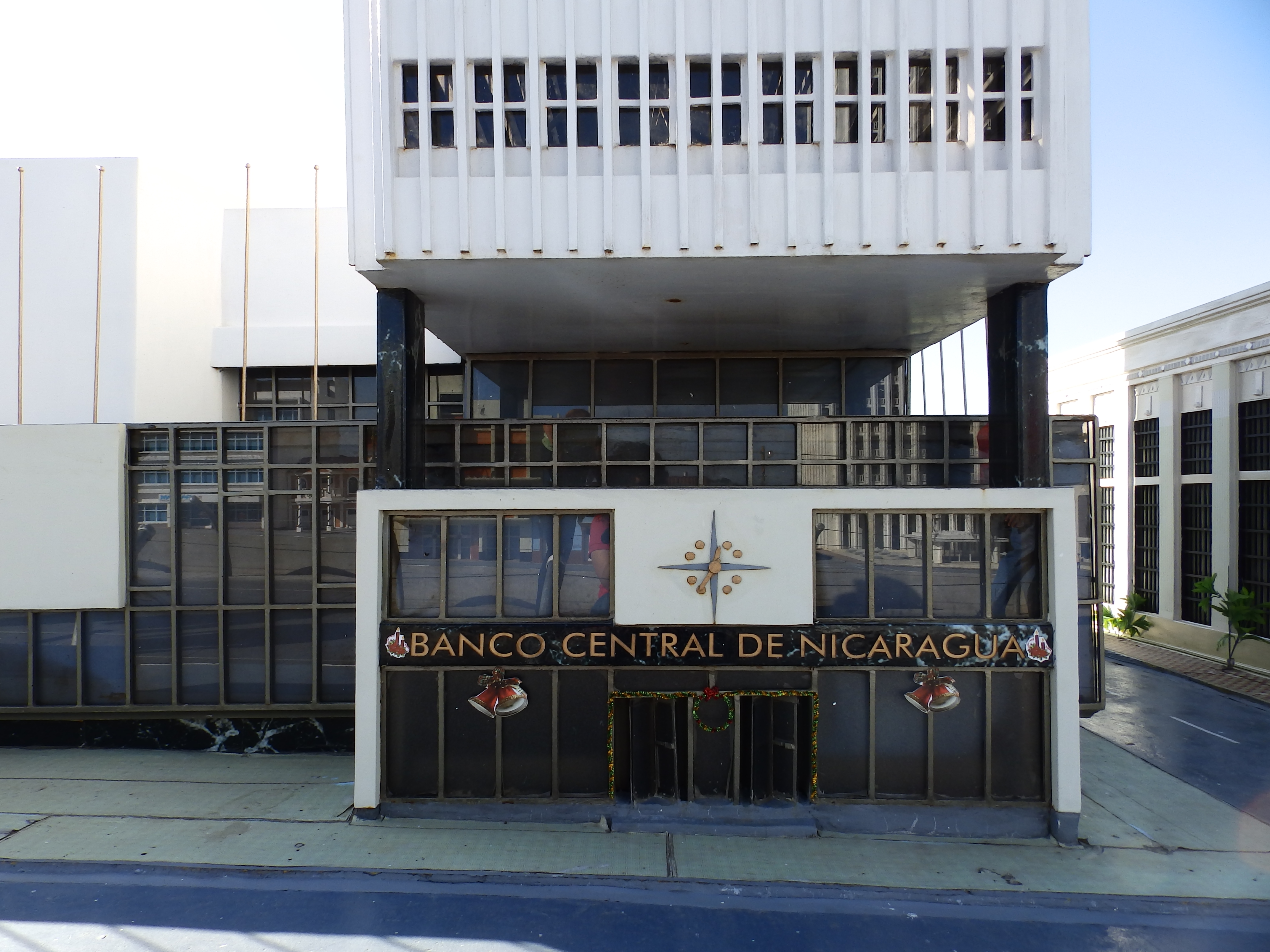 Paseo Xolotlan con estructuras de la Vieja Managua (antes del terremoto de 1972)